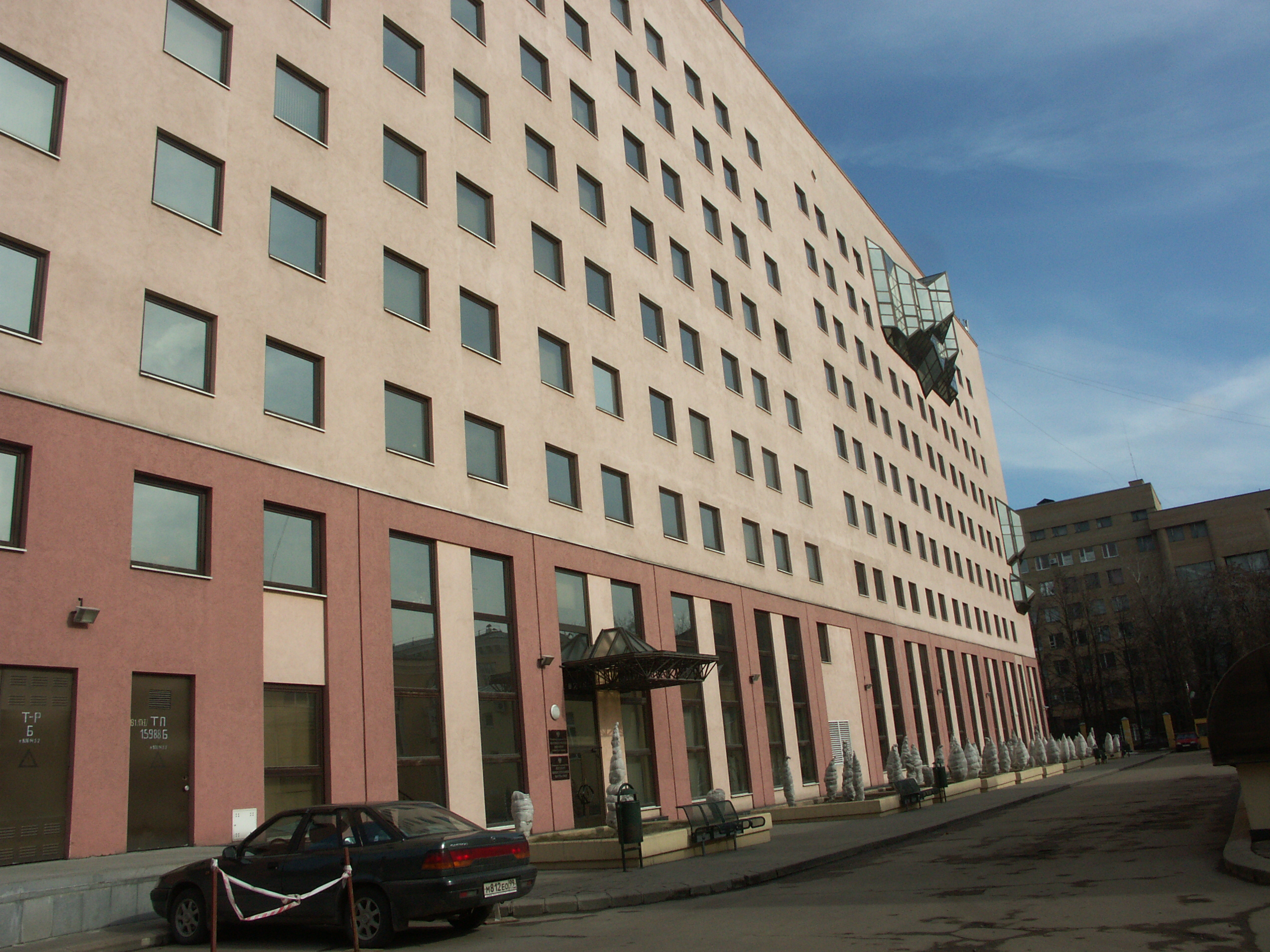 Здание МИАНа и ИВМ РАН Author: User:Glaue2dk